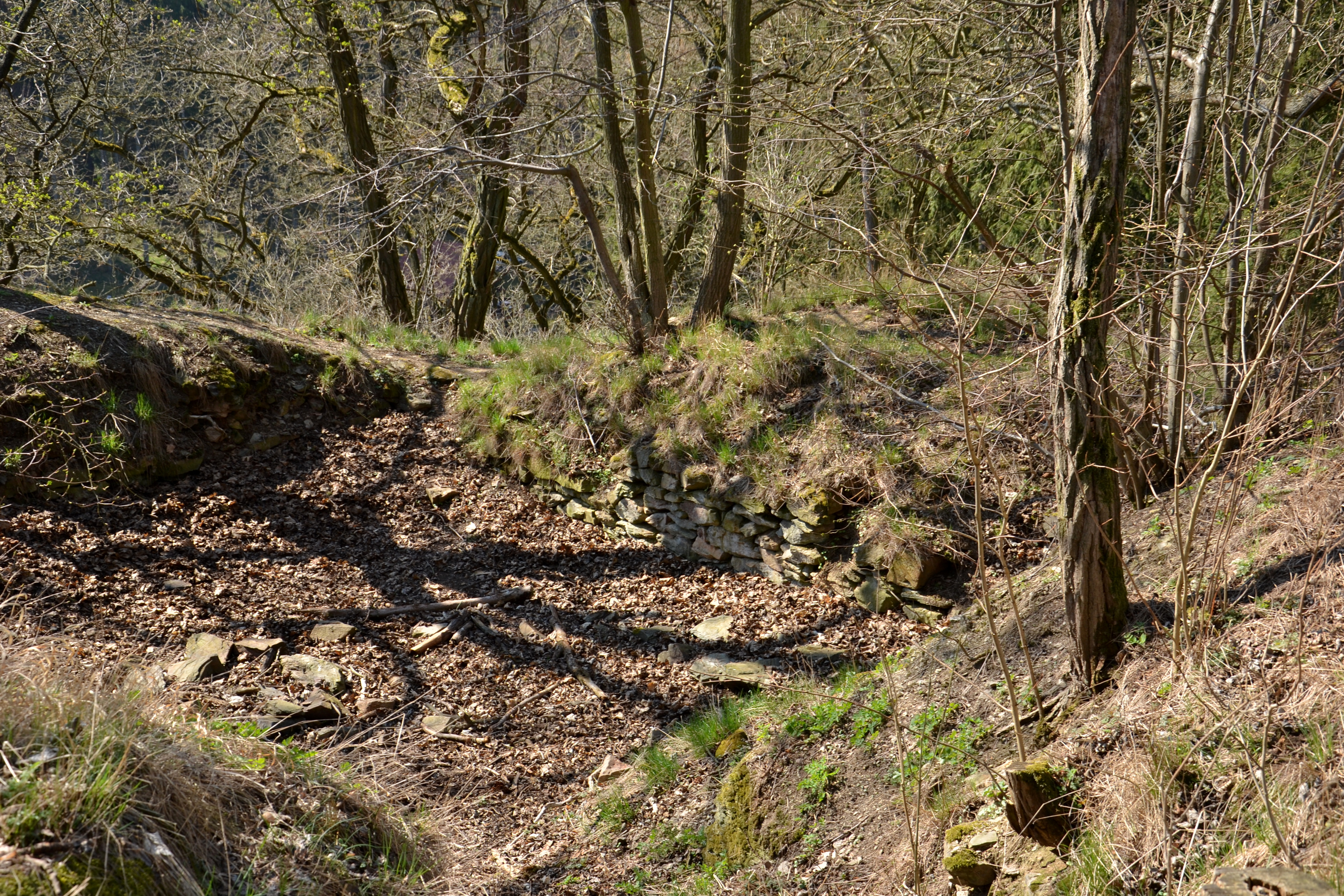 Angerbach – zemnice v přední části hradu